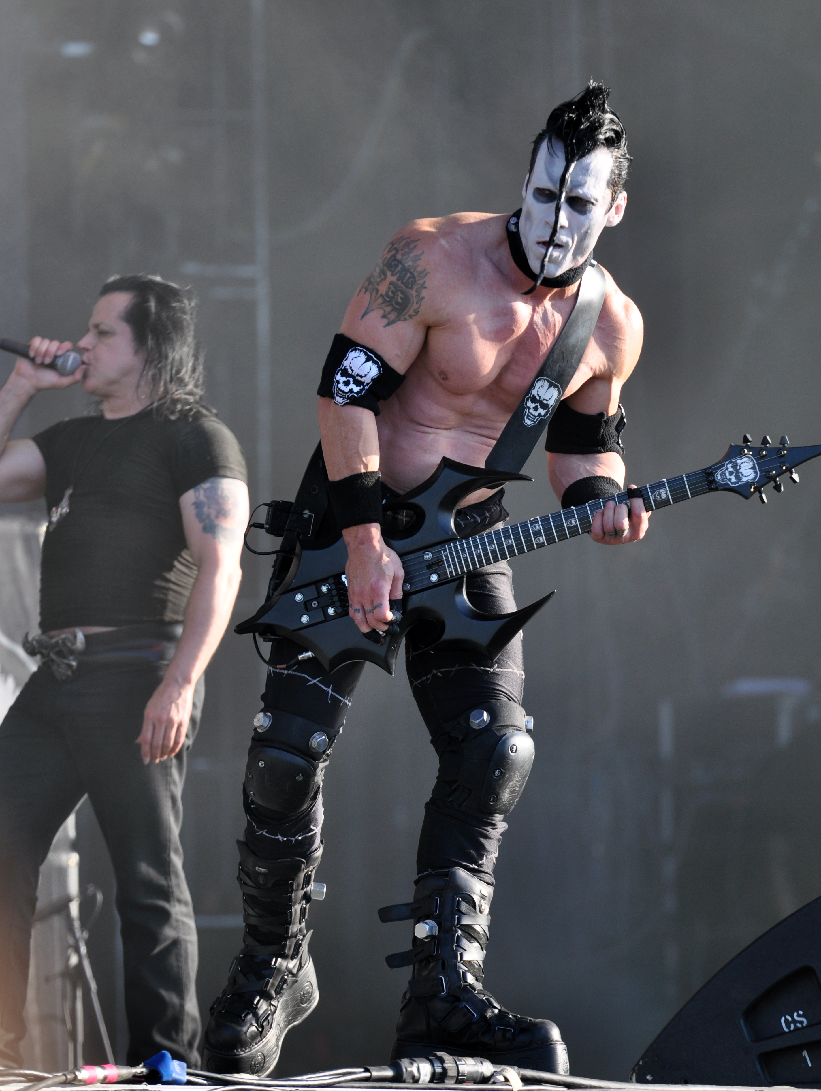 Danzig at Wacken Open Air 2013